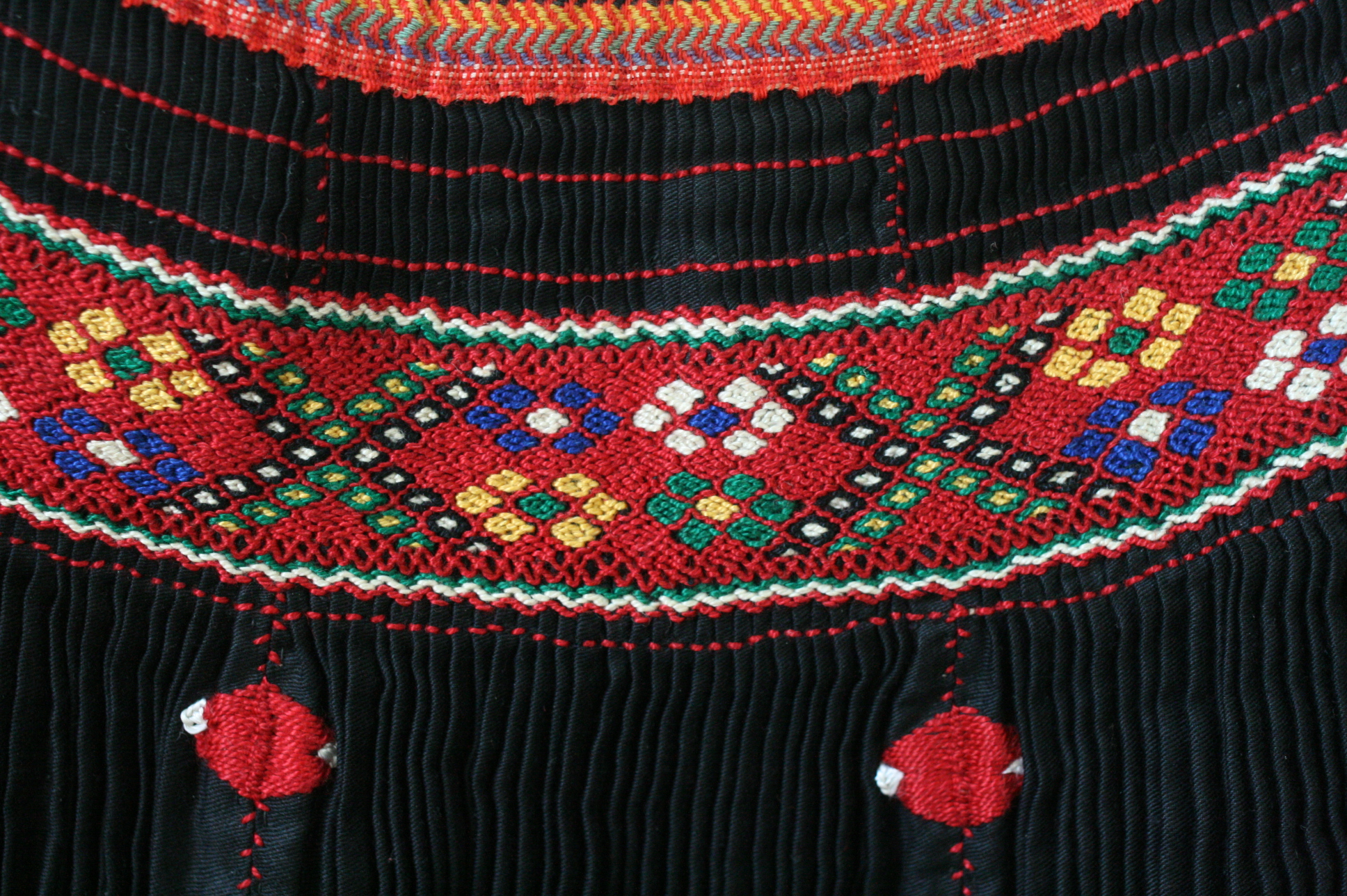 Kalotaszegi magyar kötény darázsolása (Erdély)